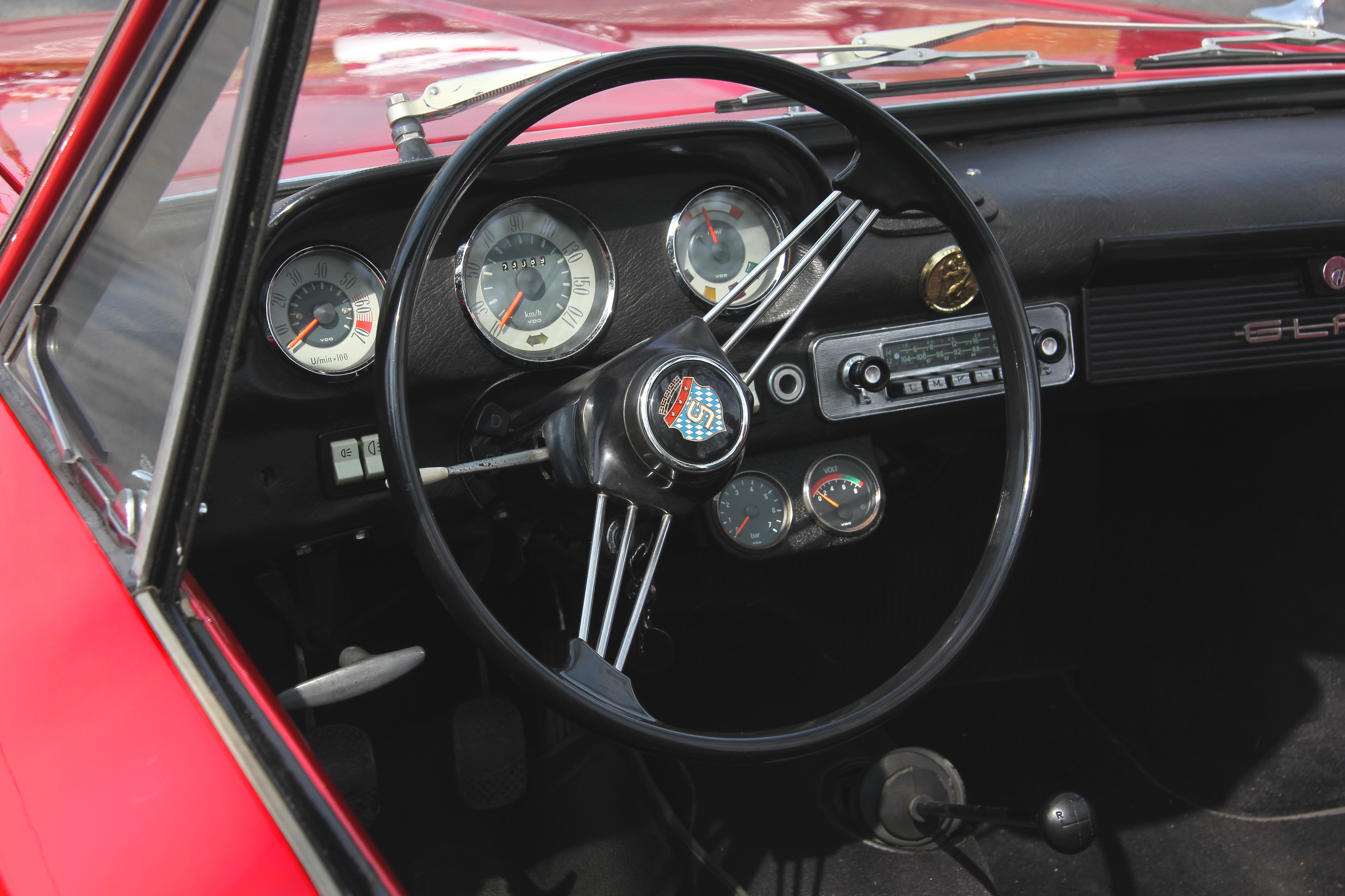 Armaturenbrett eines Glas 1204 Cabriolet, Baujahr 1964